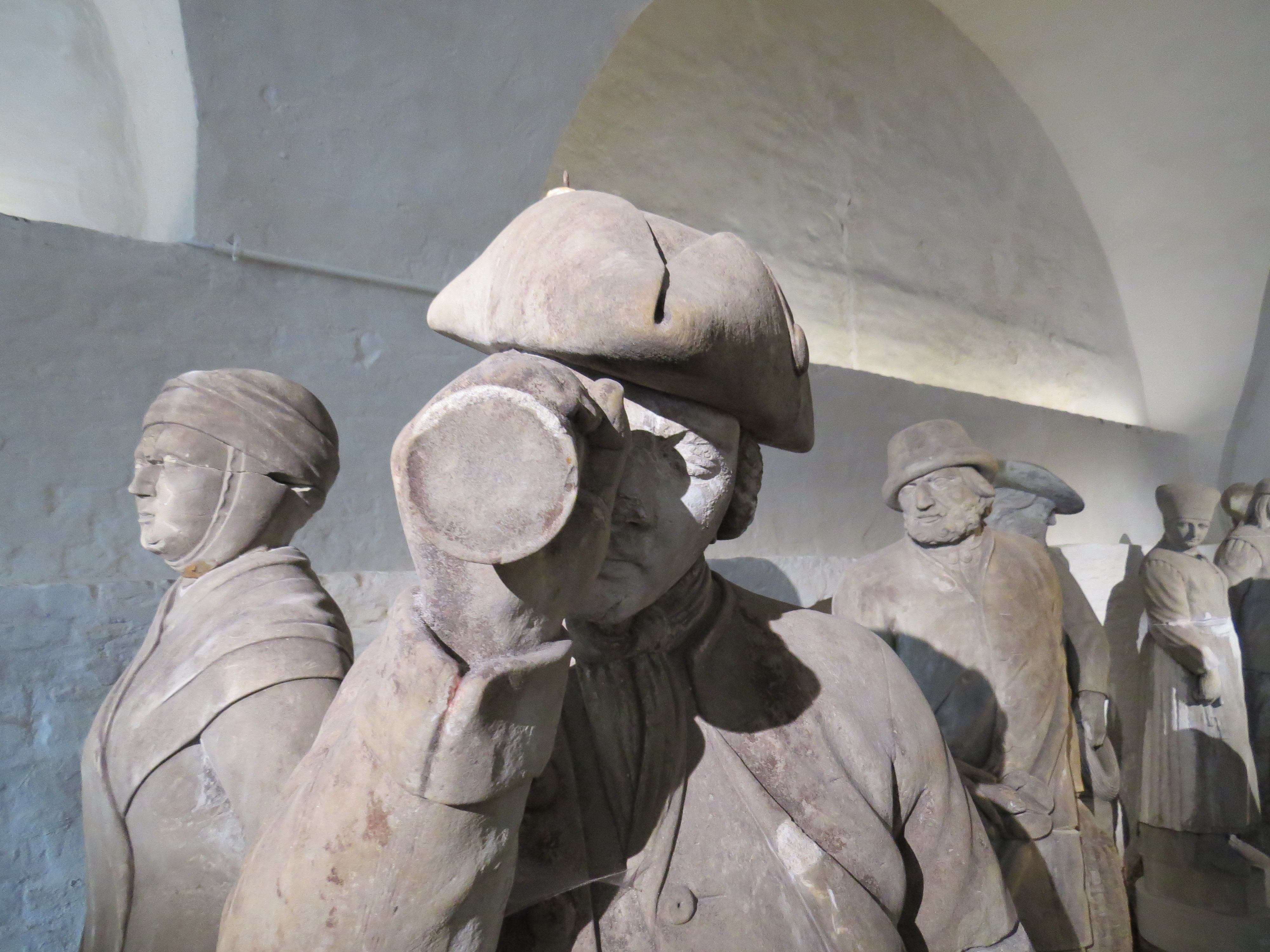 Lods fra Mandal, af J. G. Grund, Kongernes Lapidarium, København